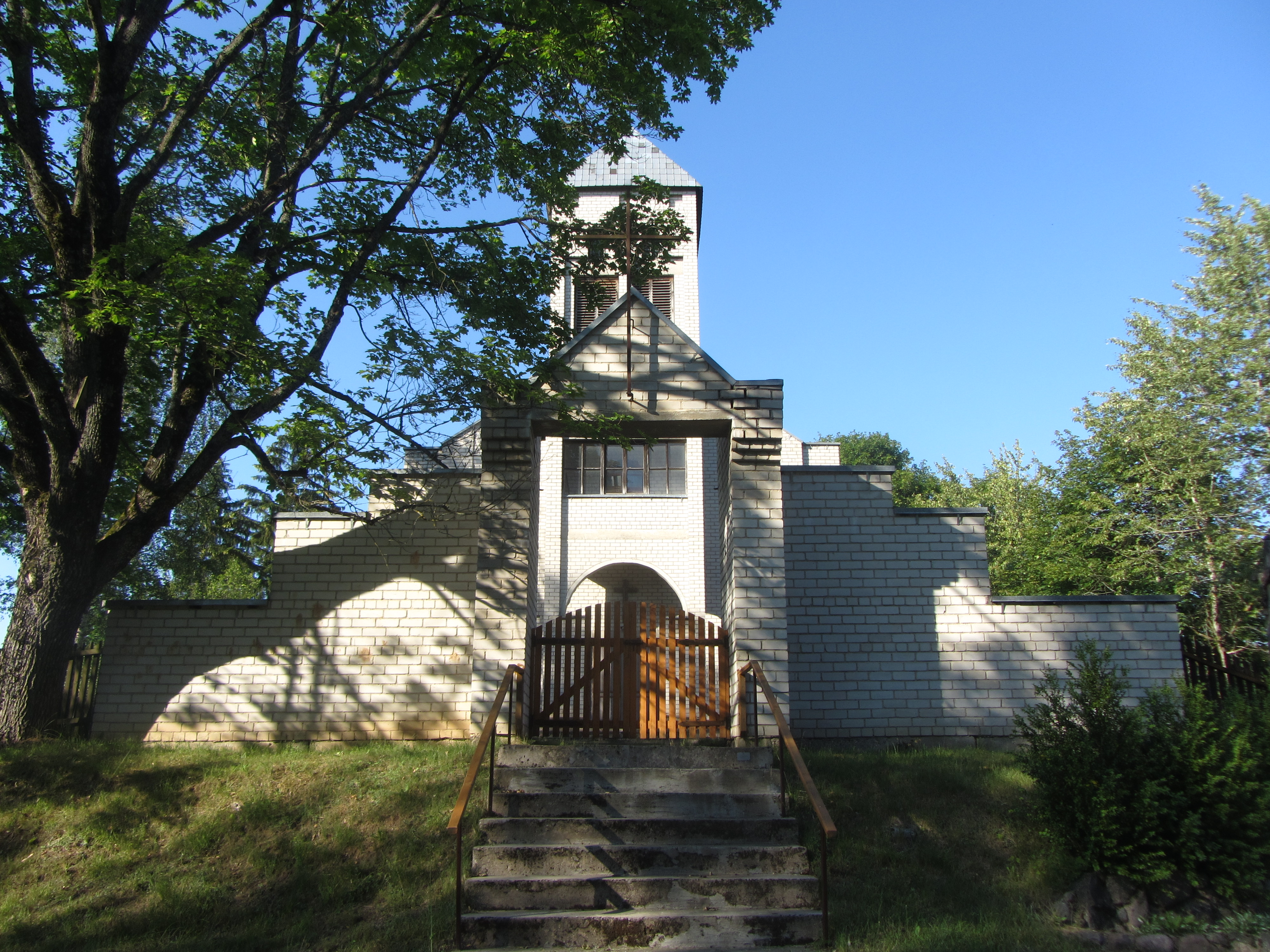 Ryliškiai, Lithuania